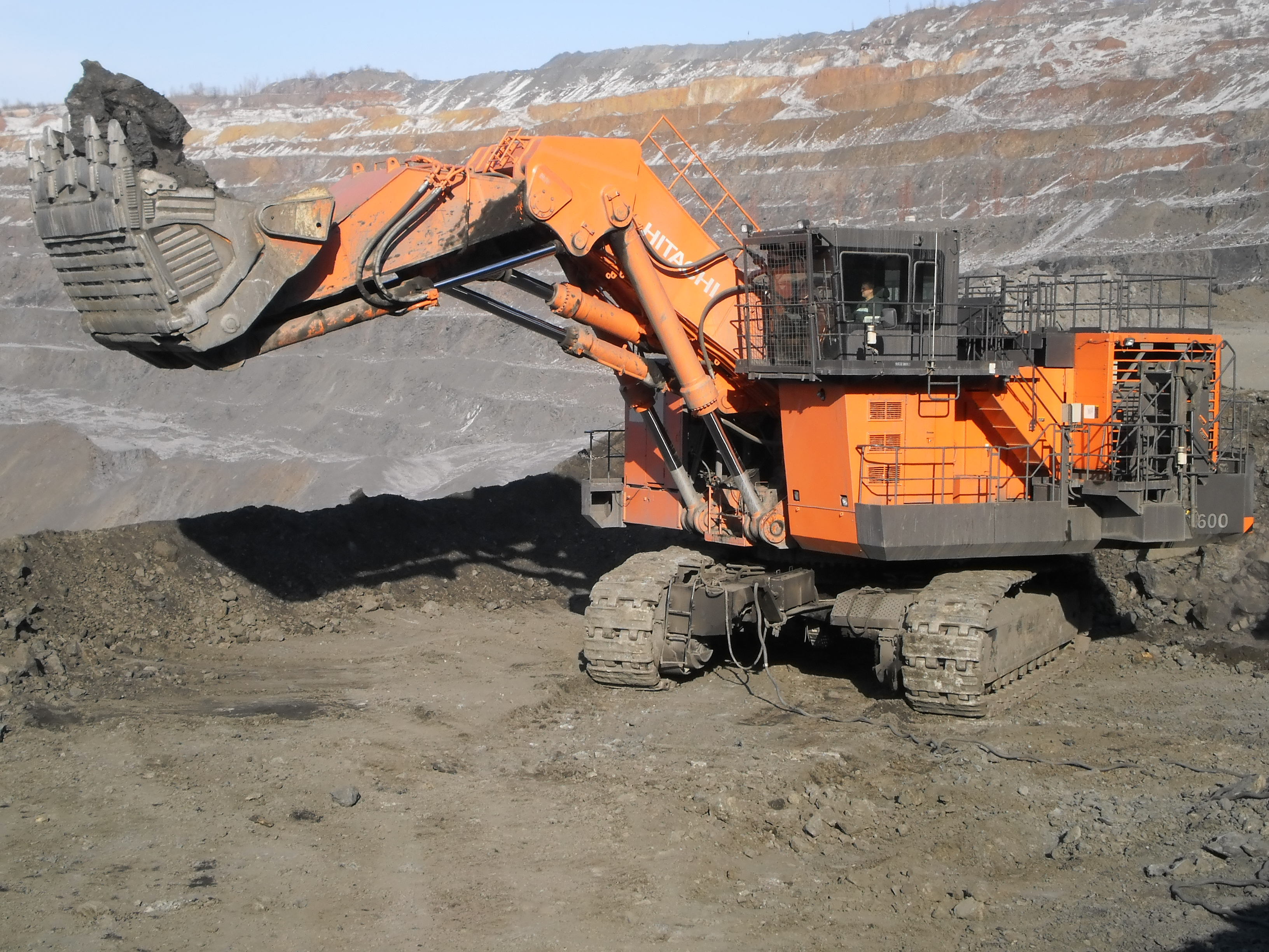 Карьерный экскаватор "Hitachi".